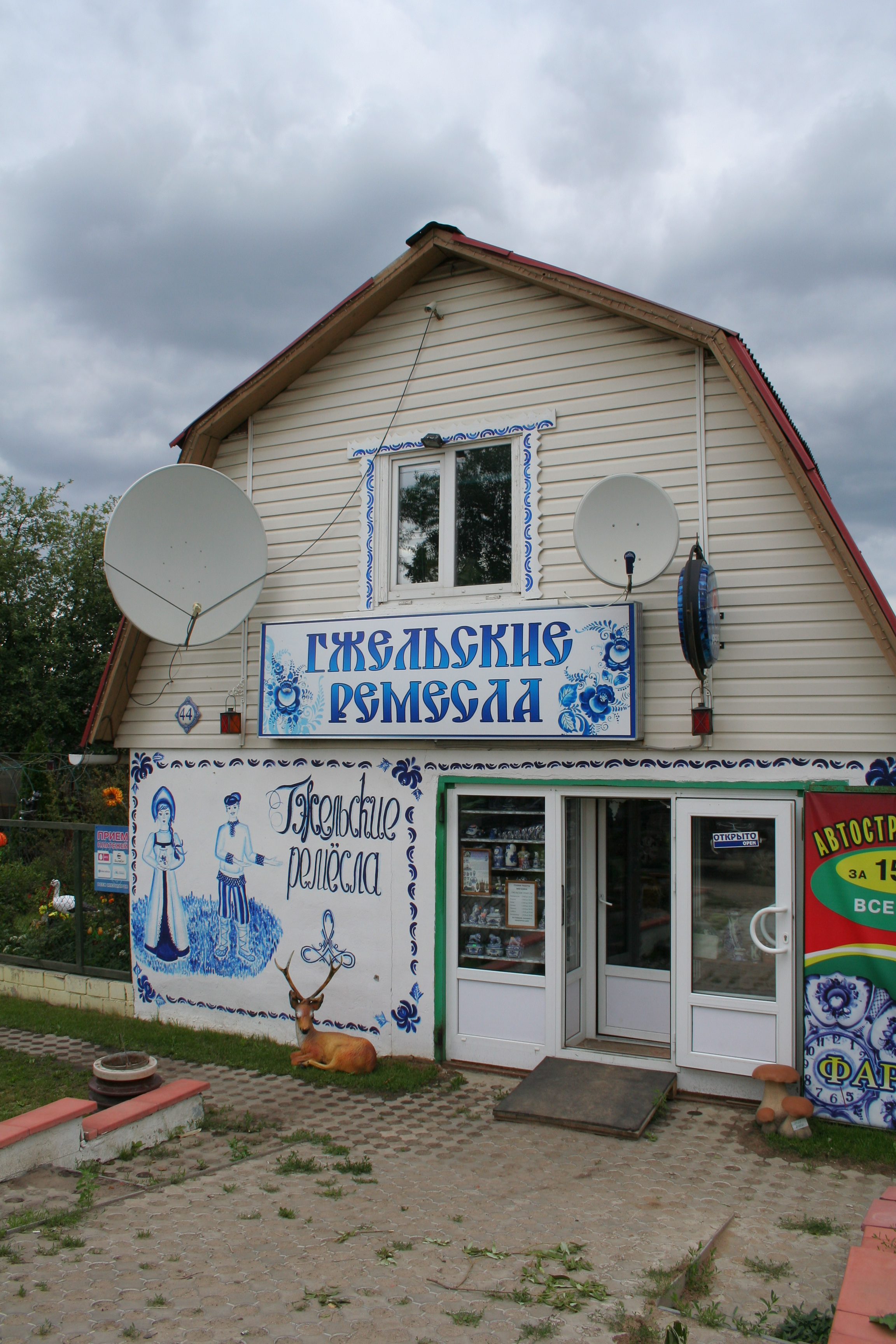 Ein Laden für lokale Keramikerzeugnisse im Kreis Gschel, Oblast Moskau, Russland.